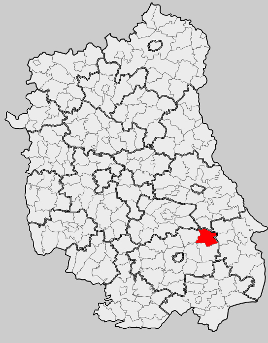 Map of gmina Grabowiec, Zamość county, Lublin voivodship Mapa gminy Grabowiec, powiat zamojski, województwo lubelskie